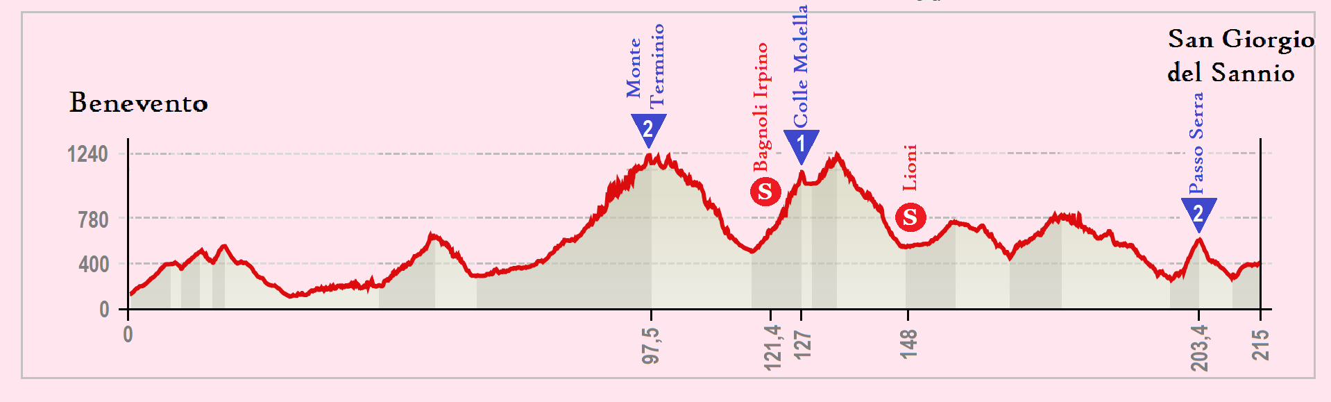 Perfil de la 9.ª etapa del Giro de Italia 2015